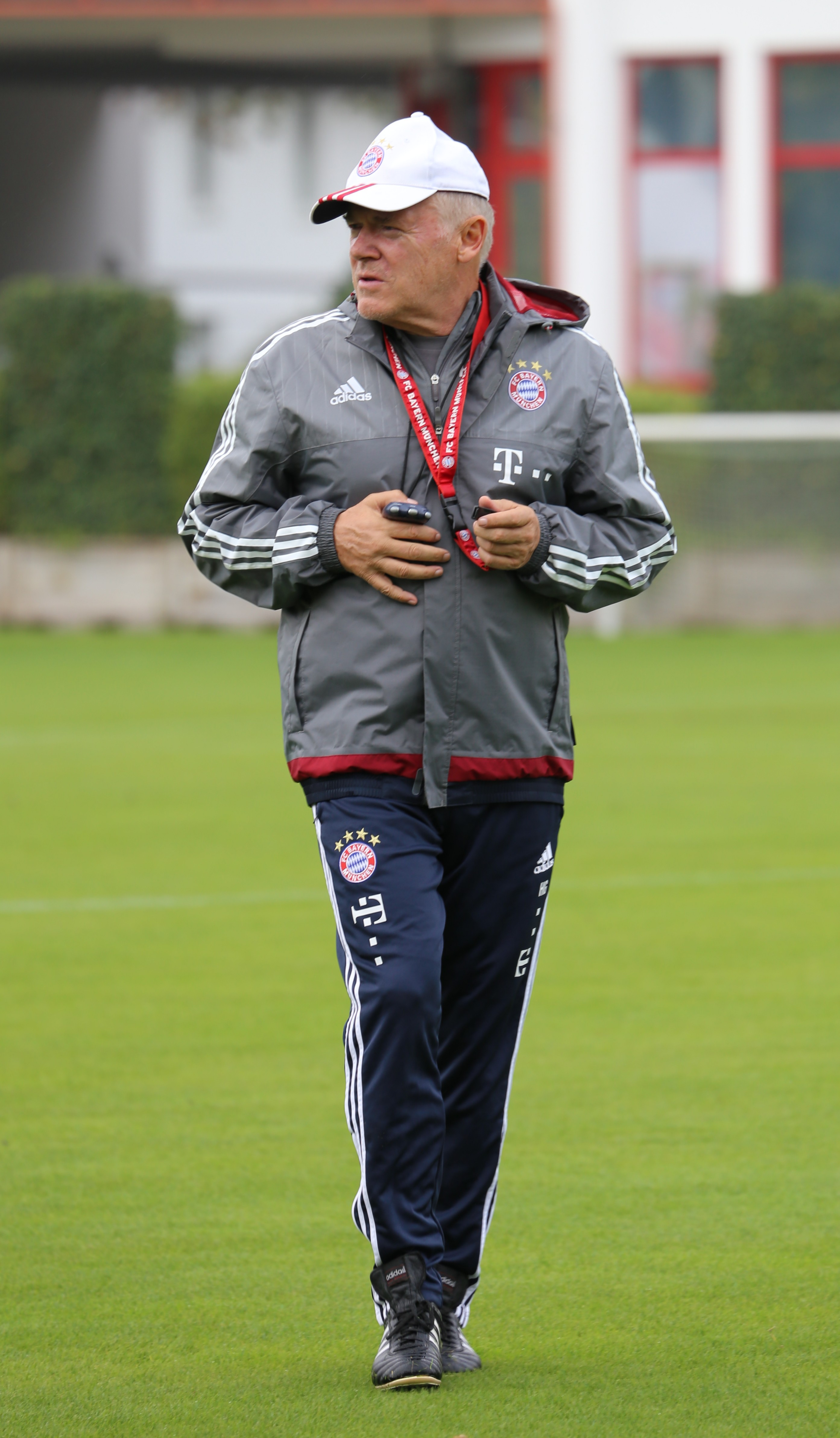 Hermann Gerland, Co-Trainer, beim Training auf dem Gelände des FC Bayern München